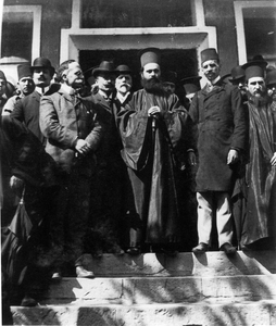 Stefanos Daniilidis and Lambros Koromilas in Voden.